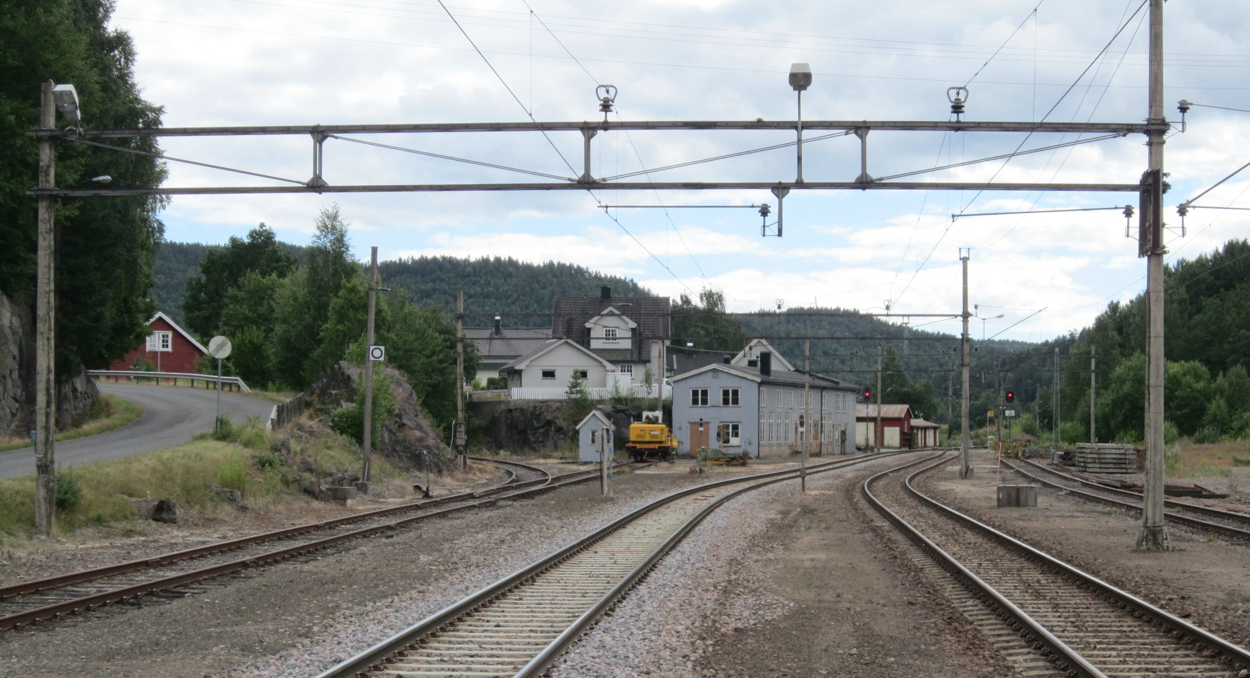 Sørover fra Neslandsvatn stasjon. Sporet til venstre går mot Kragerø, mens Sørlandsbanens spor går rett frem og i retning Kristiansand. Den lange lyseblå bygningen bak svingskiven er siden revet.